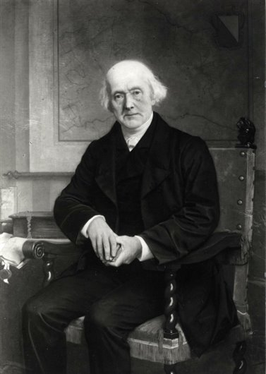 Portret van Arnoud Jan de Beaufort (1799-1866), in 1841 getrouwd met Anna Alida Stoop, lid van de Provinciale Staten van Utrecht. Kniestuk links, zittende in een stoel met op de achtergrond een kaart met het wapen van Utrecht.